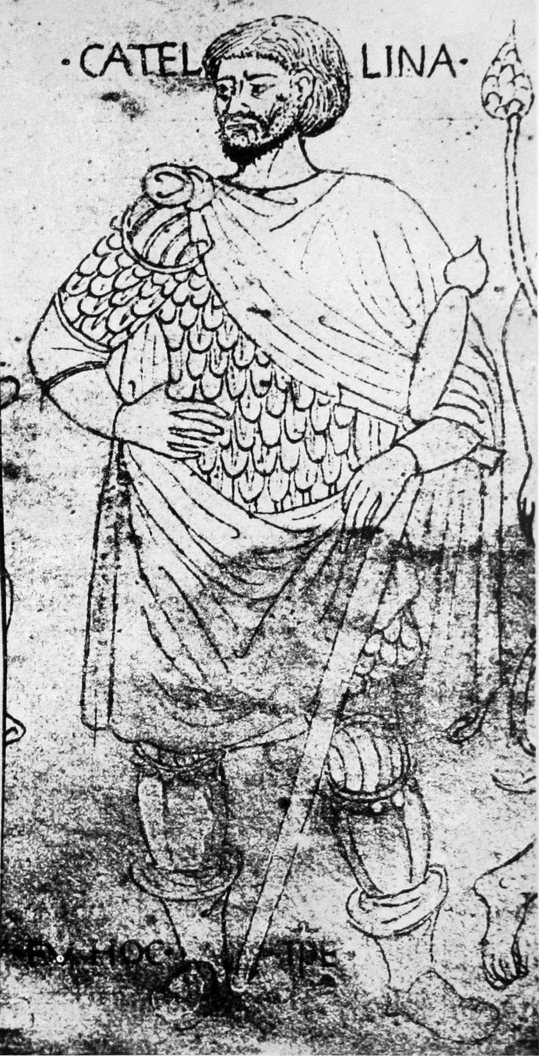 Ritratto immaginario di Lucio Sergio Catilina, dal Libro di Giusto alla Biblioteca Corsiniana di Roma.